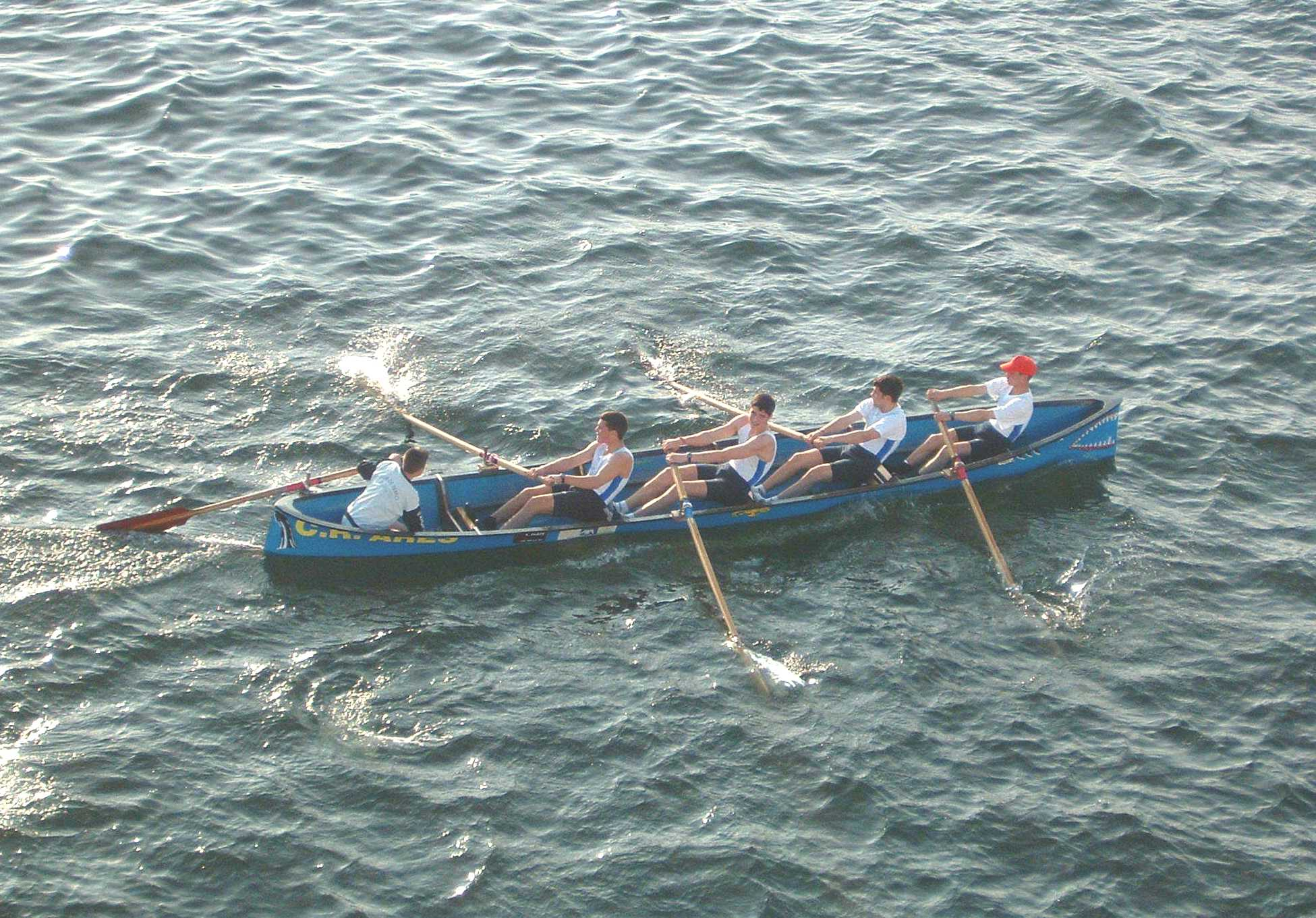 bateau à l'aviron en galice (NW Spain).